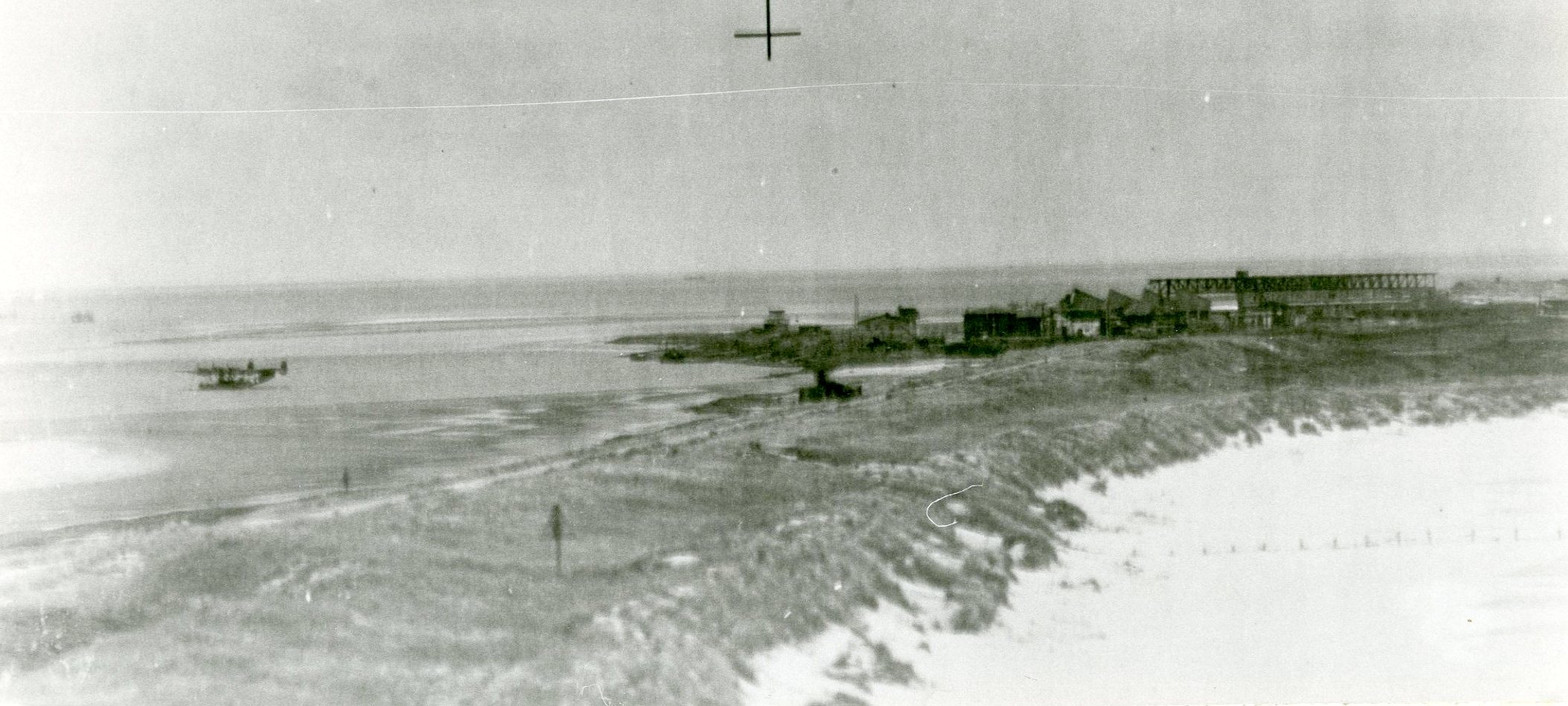 Marinevliegkamp de Mok. Een vanaf zeer lage hoogte door een Brits verkenningsvliegtuig gemaakte opname van de Mok, met een Duitse Dornier 24 voor anker.